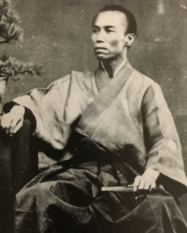 佐藤彦五郎の肖像写真。